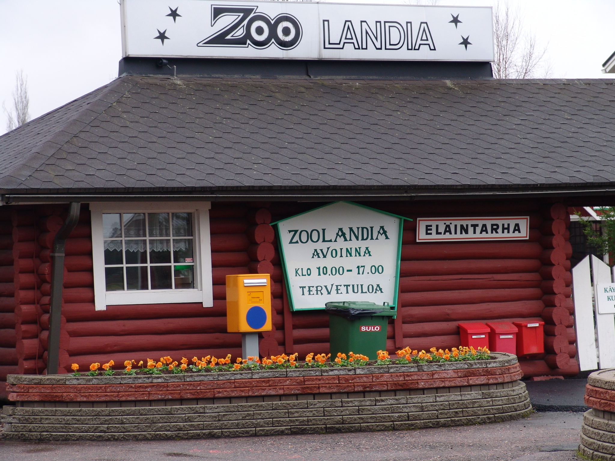 Zoolandia - зоологический парк в Лието